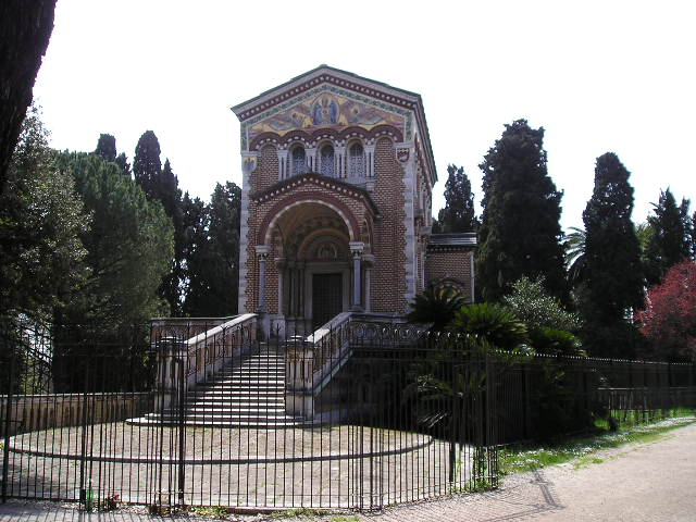 Cappella di Villa Doria Pamphili